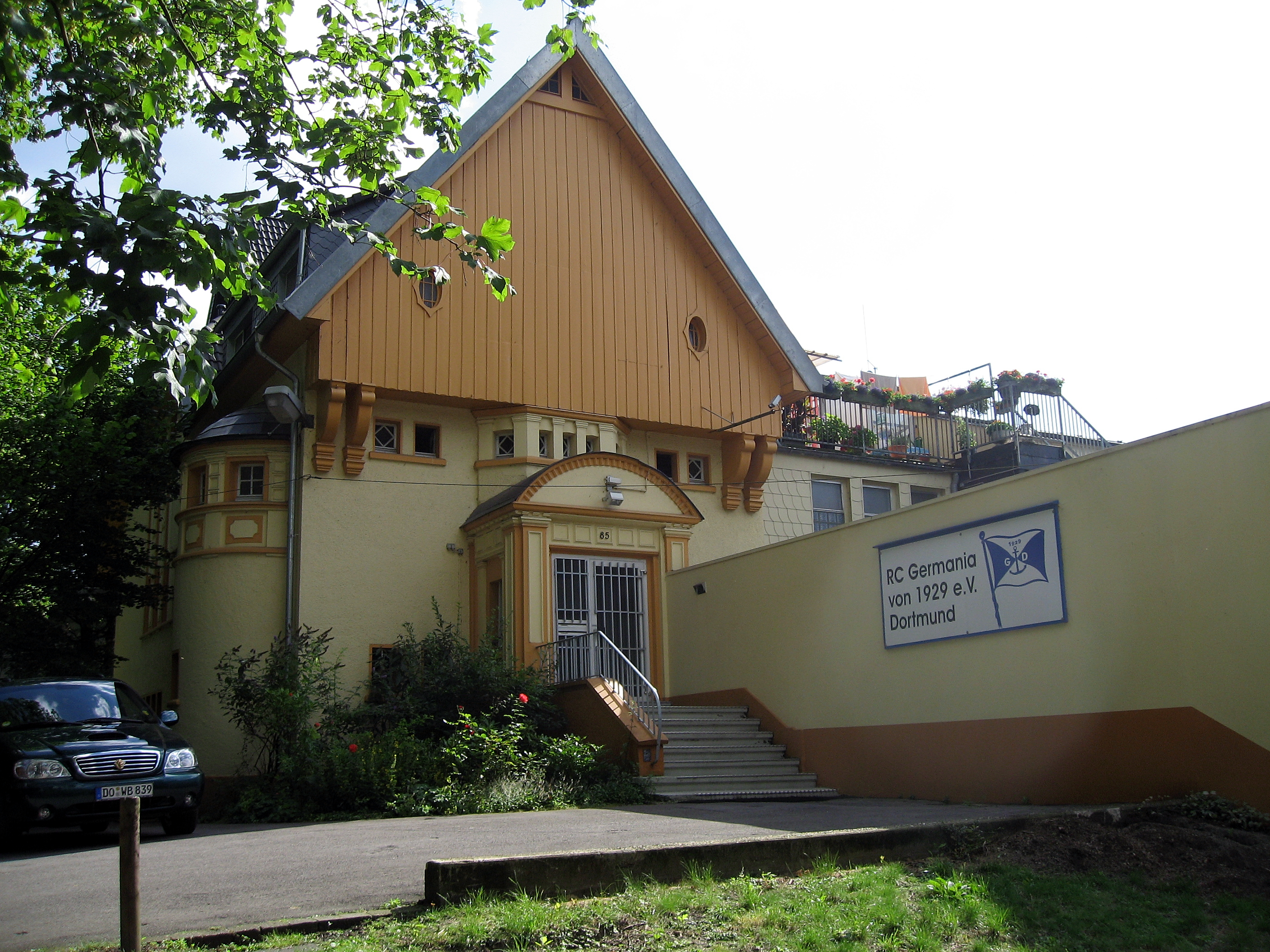 Dortmund, Fredenbaumpark, Dortmund-Ems-Kanal, Rudern, Kanu, Vereinsheim des Ruderclubs Germania